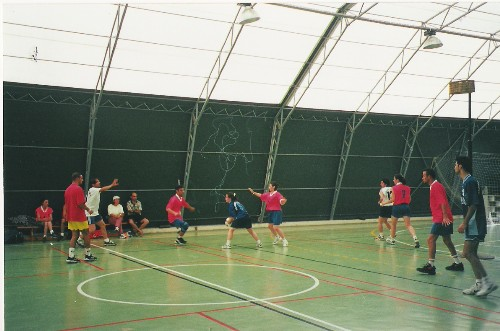 fotoğraf bana aittir